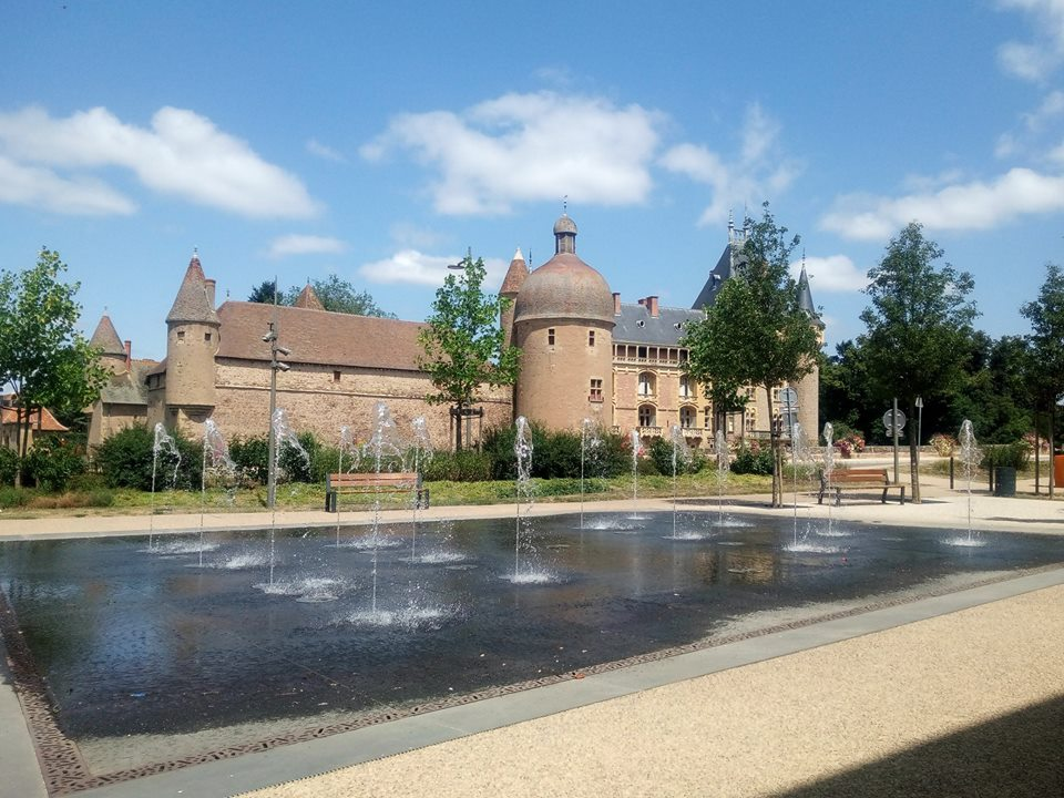 Place des Fossés avec sa fontaine de pierres de lave inaugurée en 2014 suite au réaménagement du centre-ville de La Clayette.